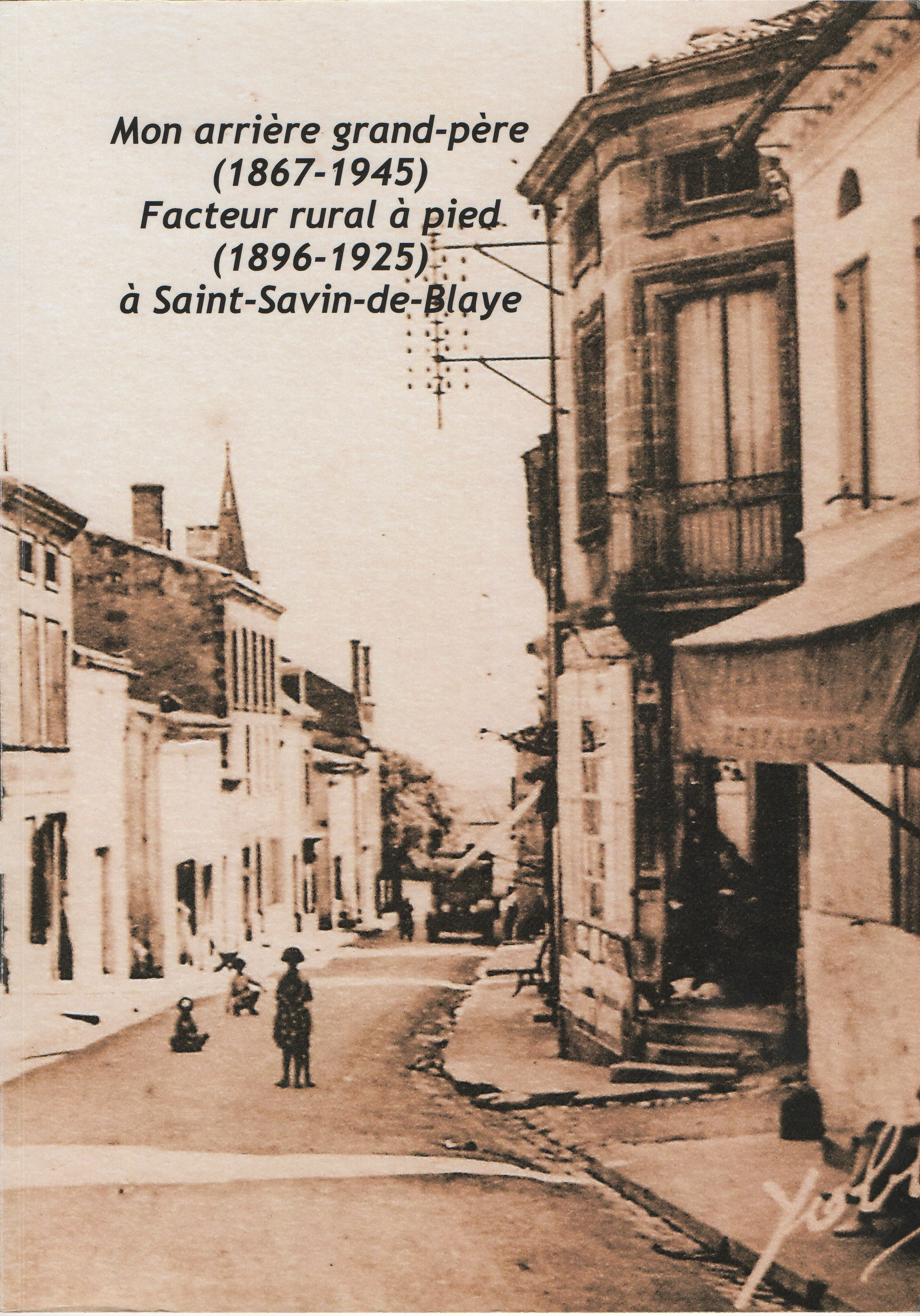 Tablette biographique. Saint-Savin-de-Blaye, France.